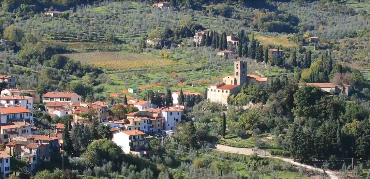 Antico borgo medioevale è situato sul fianco orientale del Montalbano. La pieve romanica un tempo fu eretta in epoca medievale sulle rovine dell'antica rocca che dominava l’intera vallata.